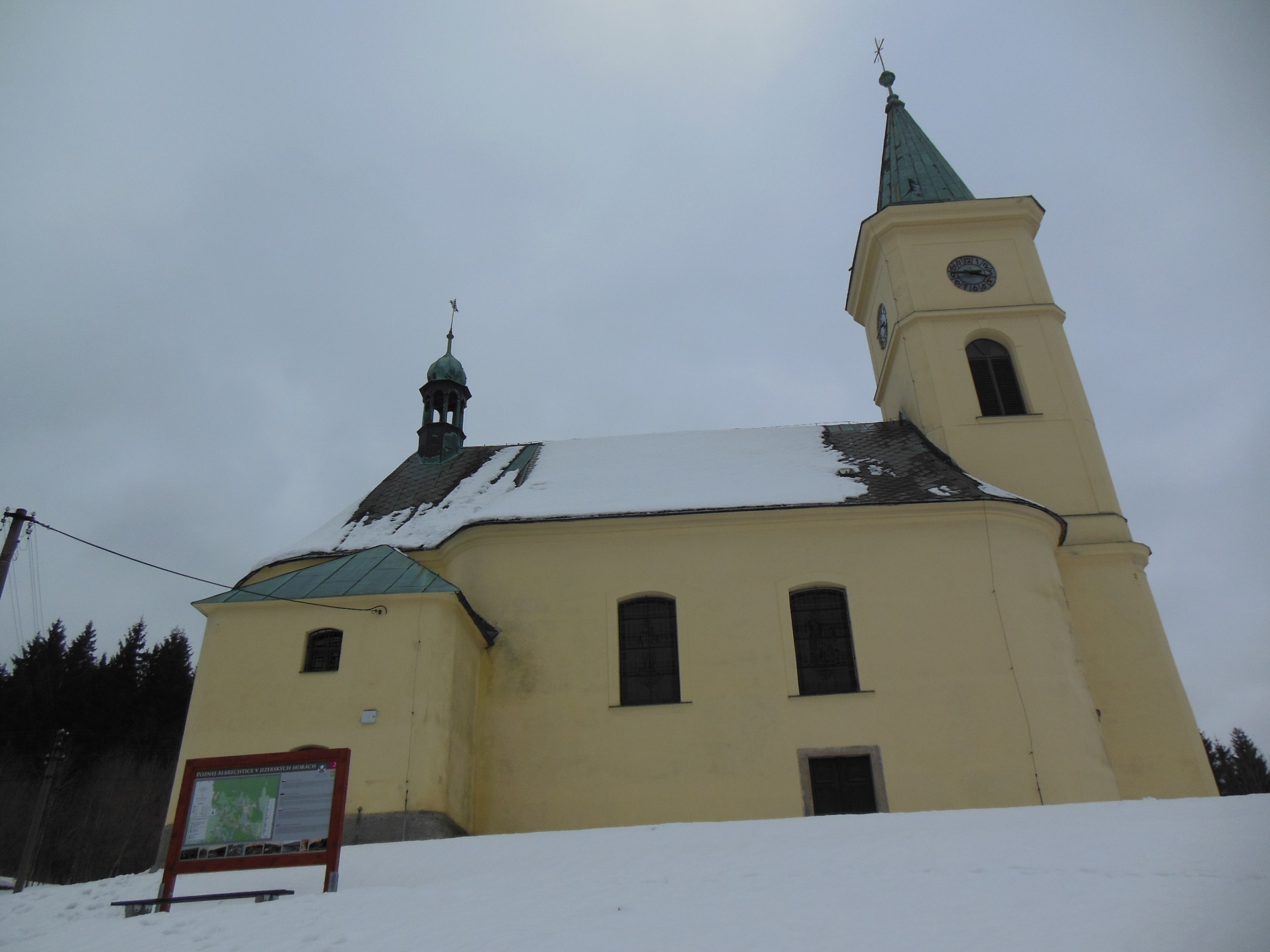 Kostel svatého Františka z Pauly v Albrechticích v Jizerských horách (okres Jablonec nad Nisou).